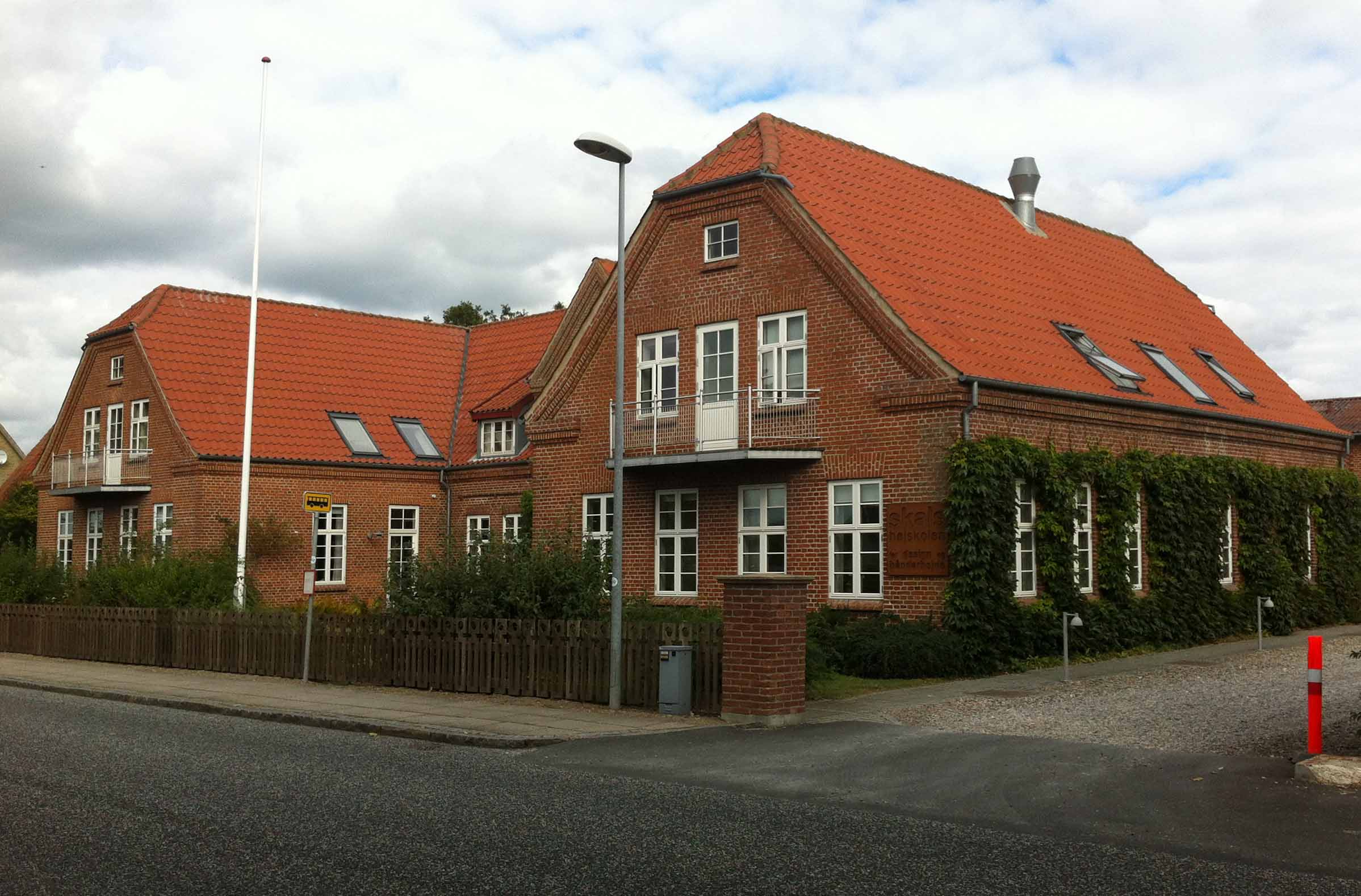 Skals Håndarbejdsskole